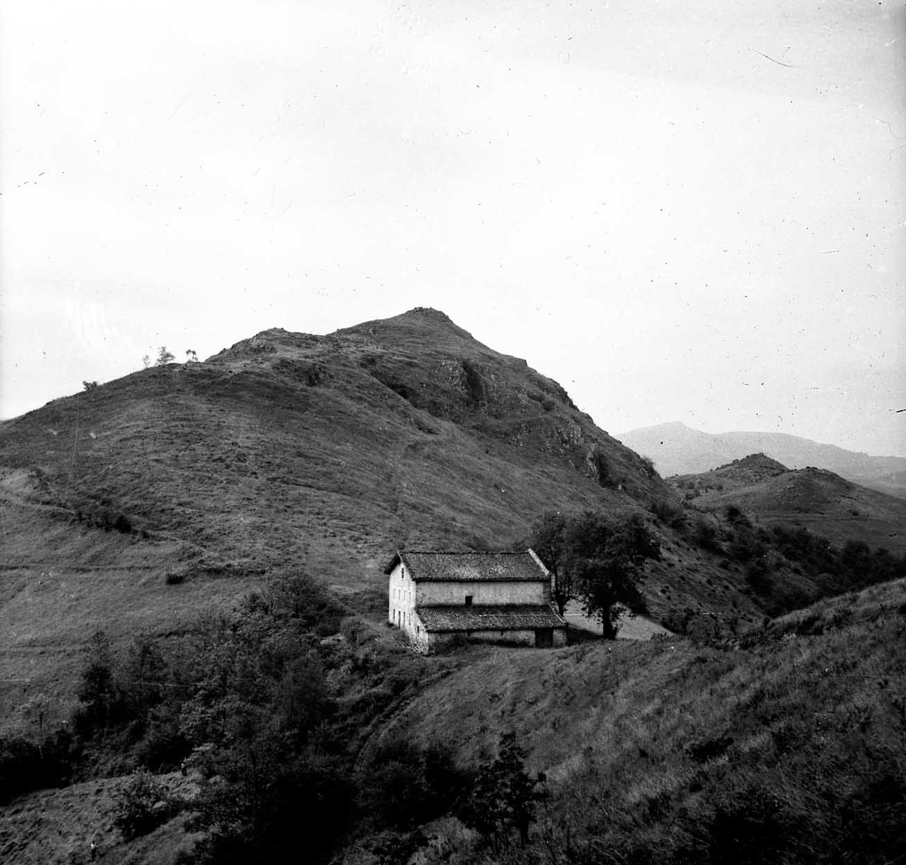 Zarateko benta eta Zarateaitz mendia 1947an Indalezio Ojangurenek ateratako argazkian